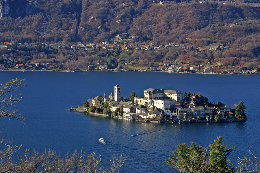 Veduta del Lago d'Orta con l'isola di San Giulio, fotografata dal Sacro Monte di Orta.